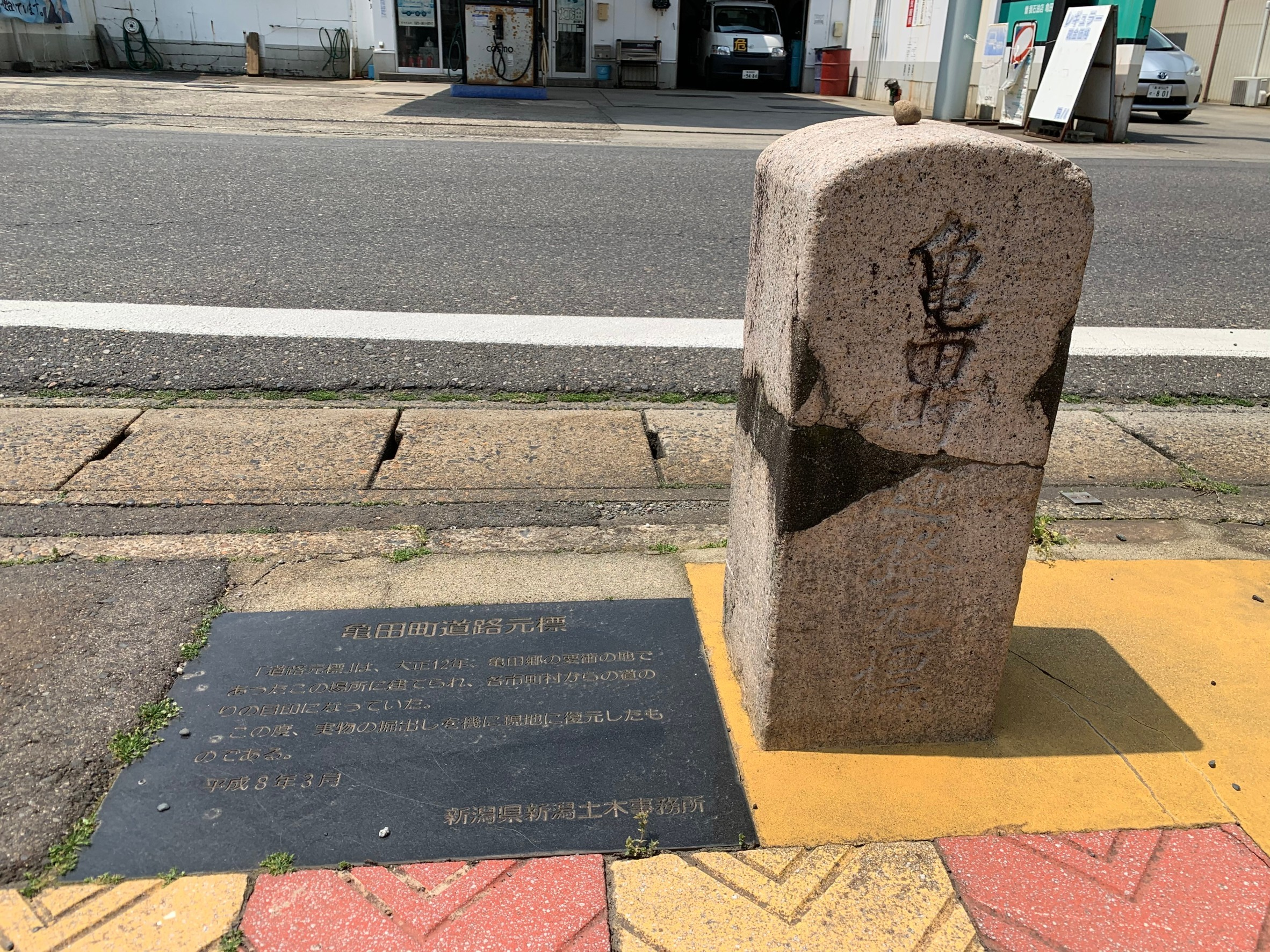 亀田町道路元標（新潟市江南区，2020年5月）